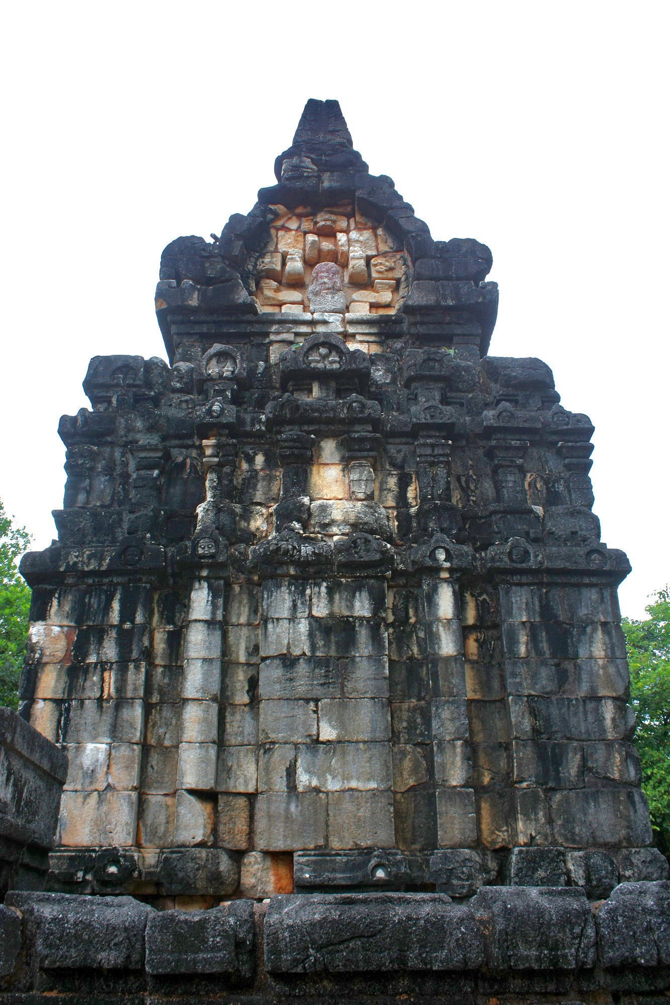 நாலந்த சிலை மண்டபம்